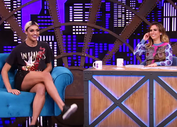 Tatá Werneck entrevistando Pabllo Vittar no Lady Night em 2017